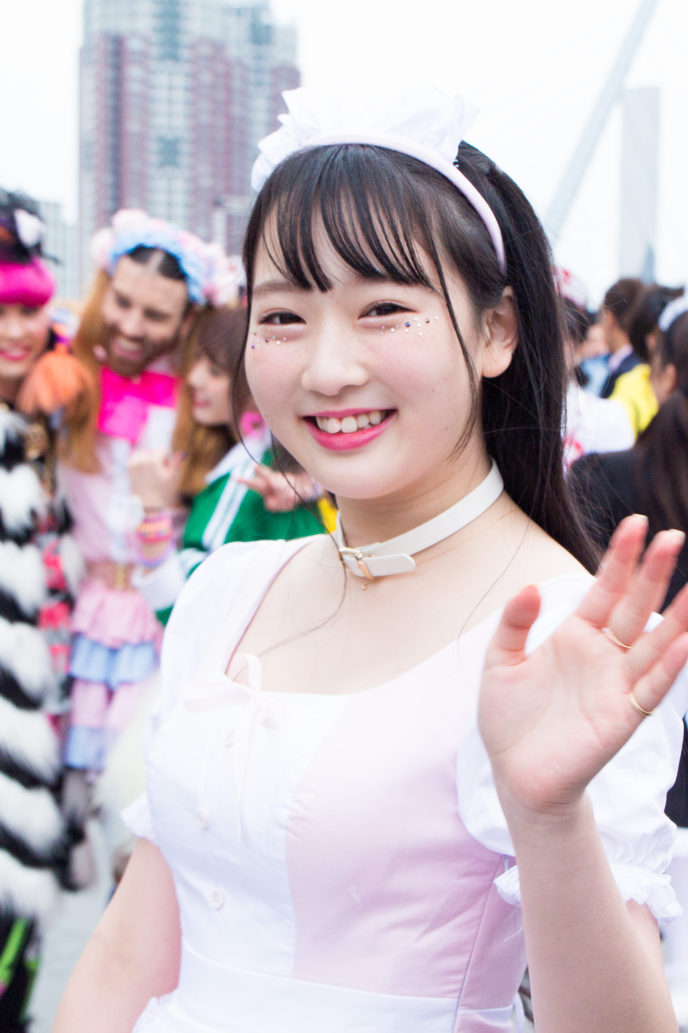 T-SPOOK 2016 越智ゆらの